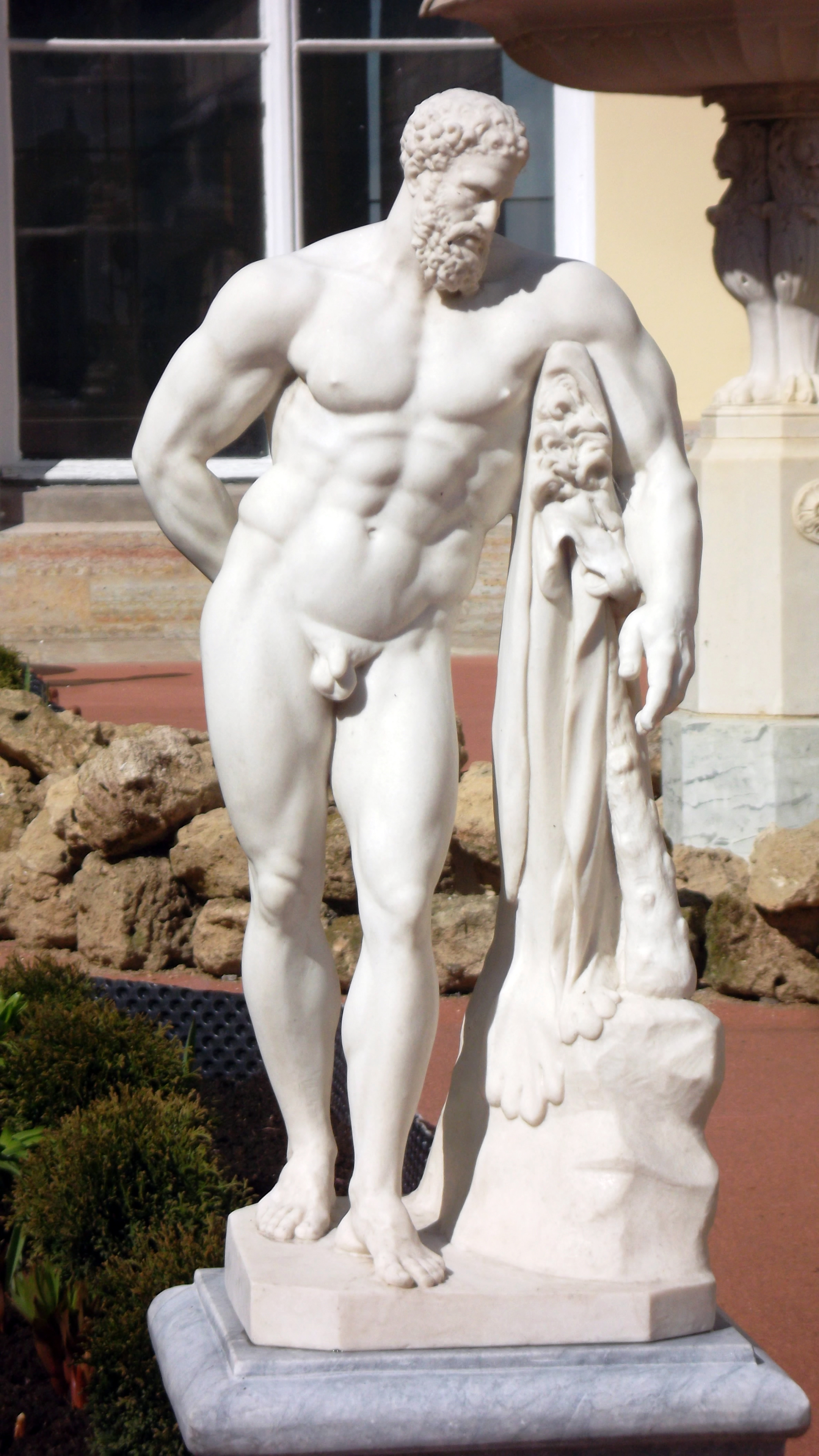 Cтатуя «Геракл Фарнезский» (копия XVIII в. античного оригинала) в Висячем саду Малого Эрмитажа. Копия с мраморного оригинала выполнена в 2009 г. ООО «РМ «Наследие» методом прямого копирования и отлита из полимербетона (полиэфирная смола с мраморной крошкой).